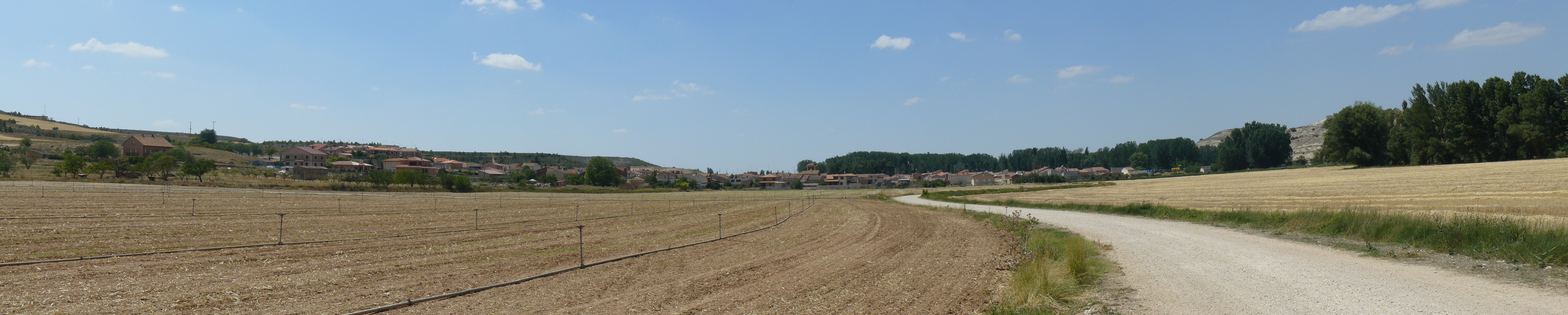 Milagros, Burgos.